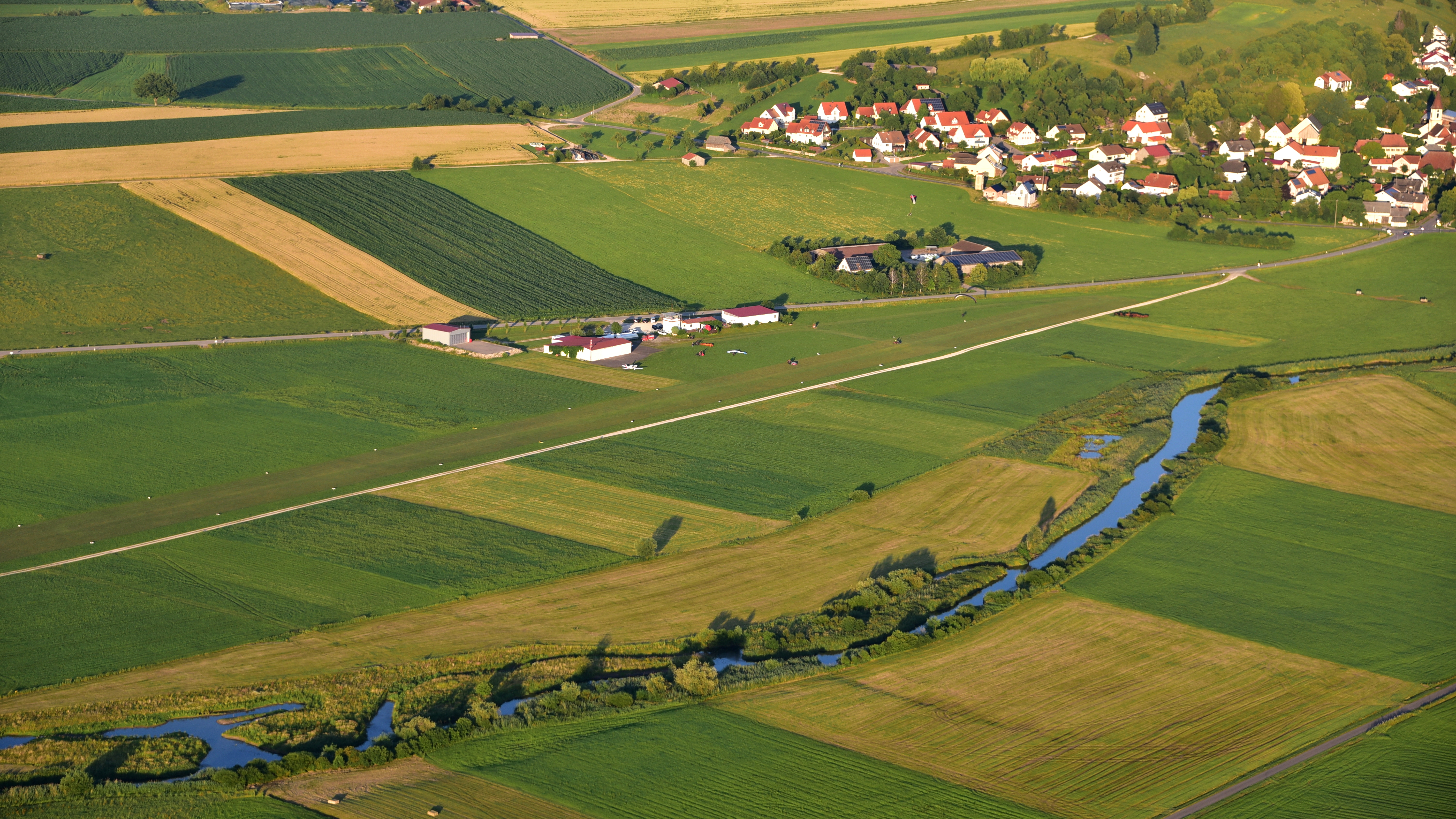 Treuchtlingen-Bubenheim, Flugplatz, Luftaufnahme (2016)